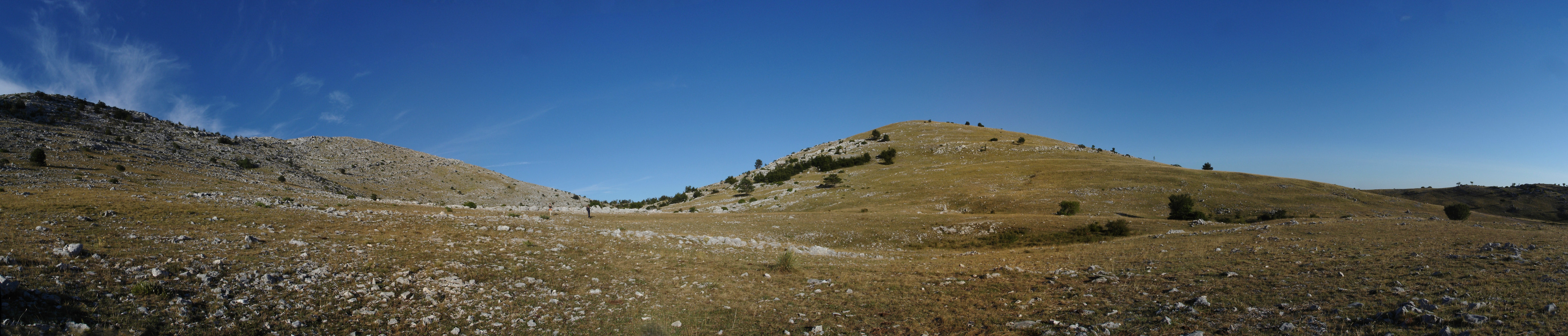 Planina Svilaja, pogled na vrh Bat